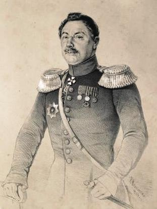 General-Leitenant Kniaz' I. M. Andronnikov.